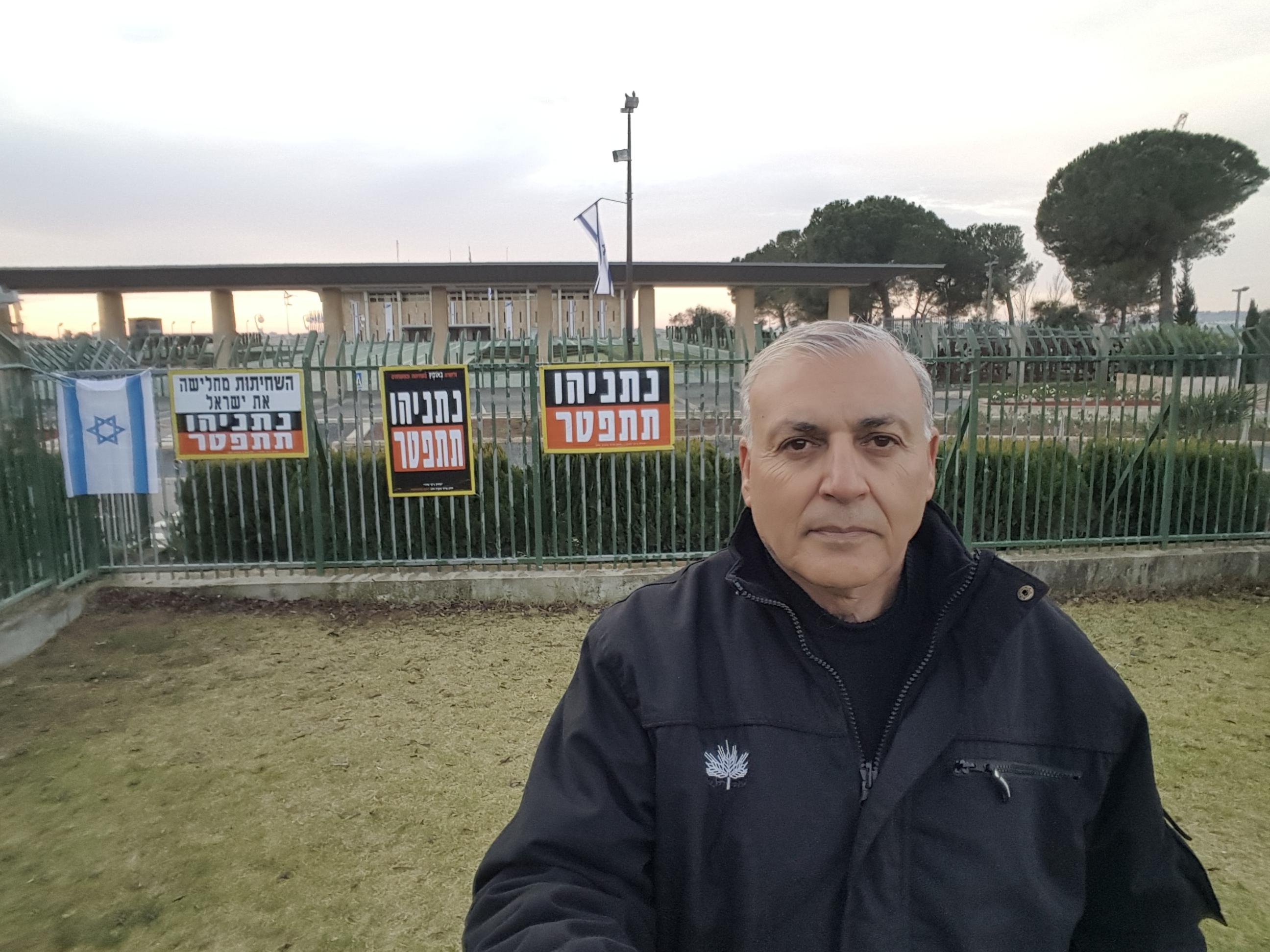 .מסע עוטף ישראל במחאה אישית בהפגנת יחיד בקריאה: נתניהו תתפטר